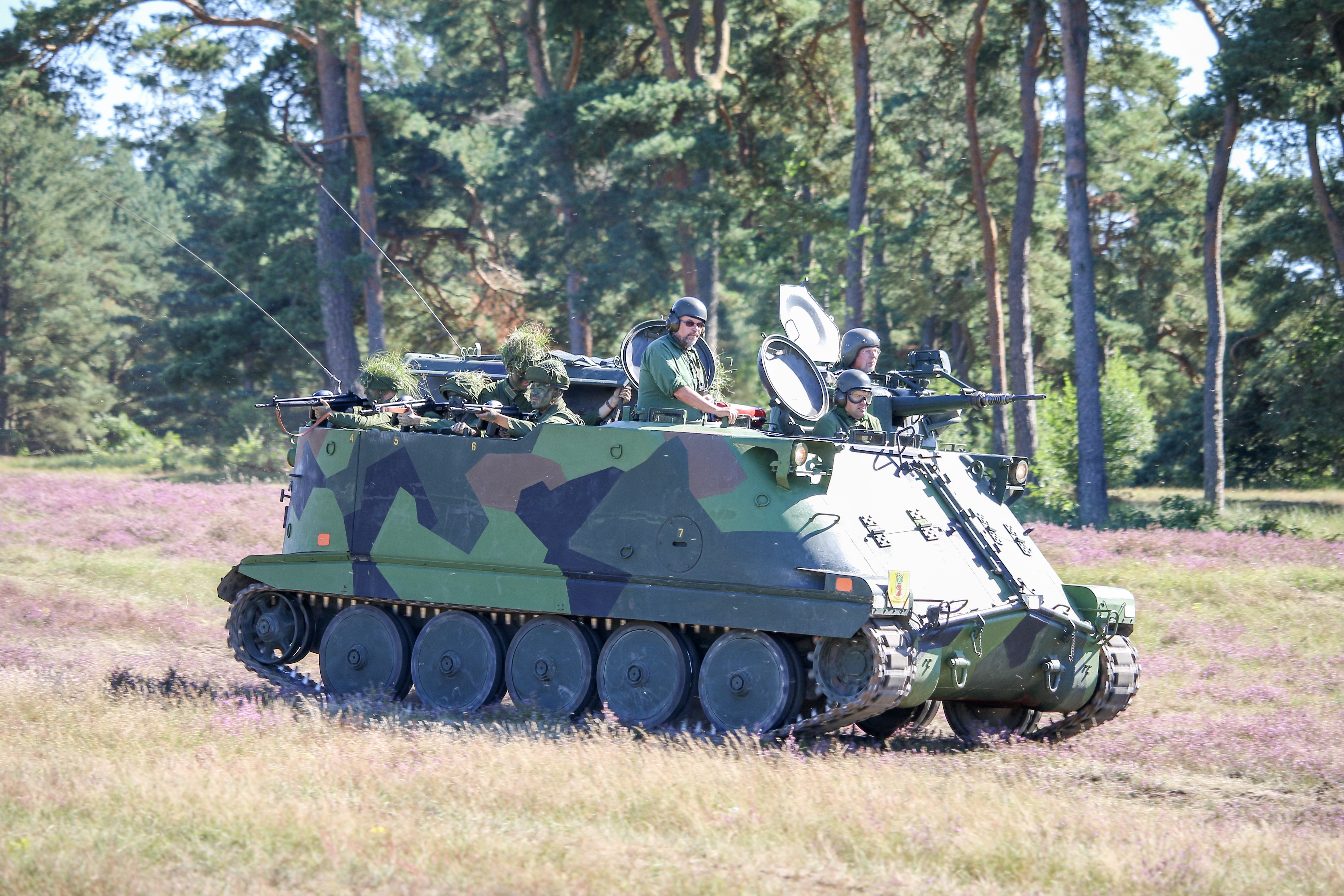 Pansarbandvagn 302 Revinge 2016